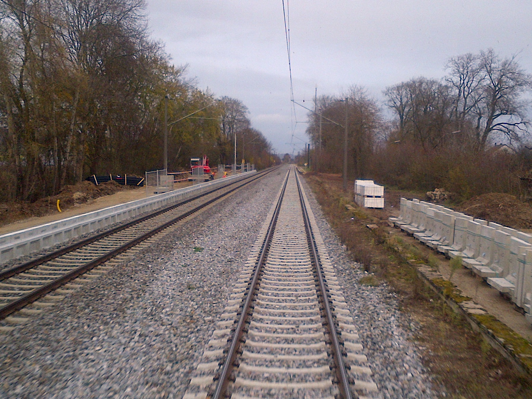 Blick aus dem Führerstand eines Regionalzuges auf den neuen, im Bau befindlichen Bahnsteig in Blindheim (Donautalbahn Bayern)